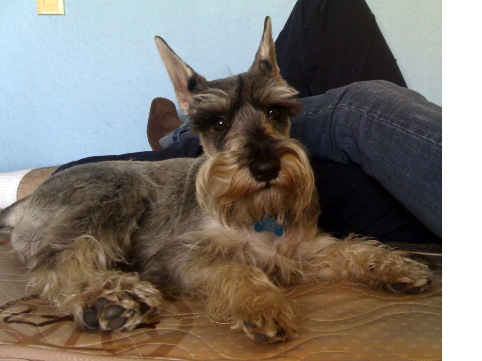 Schnauzer Standar